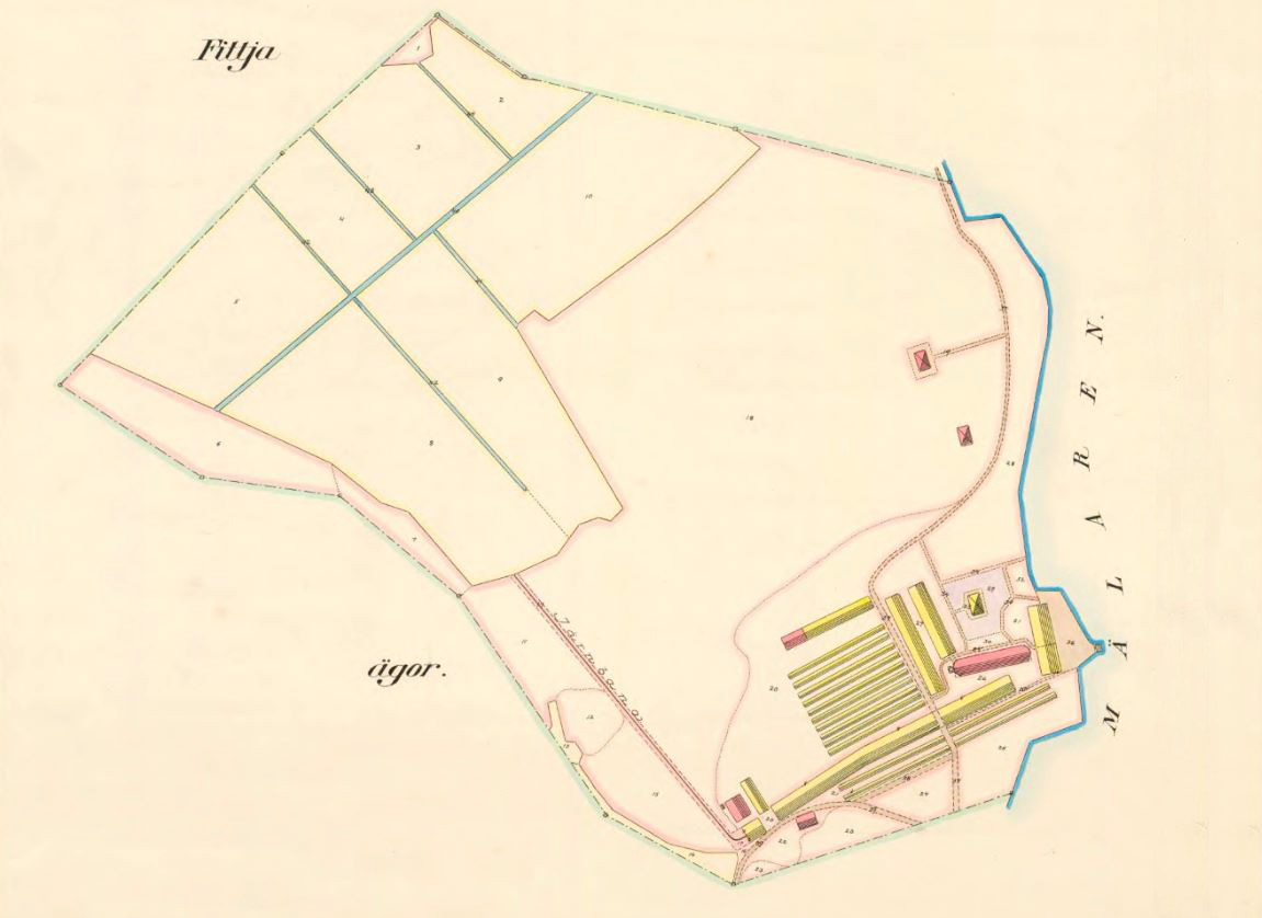 Avstyckning Fittja tegelbruk från Fittja gård